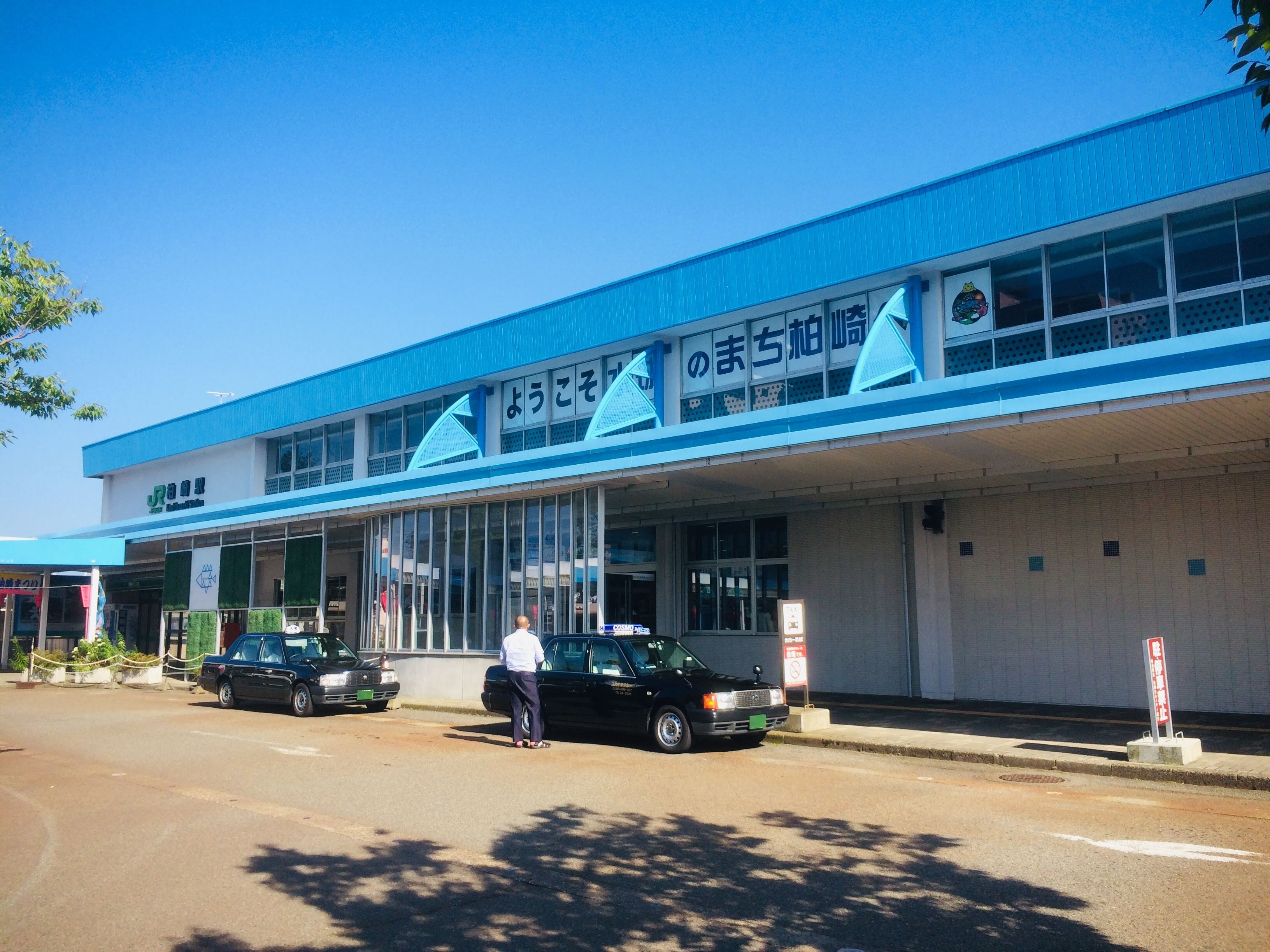 柏崎駅の駅舎